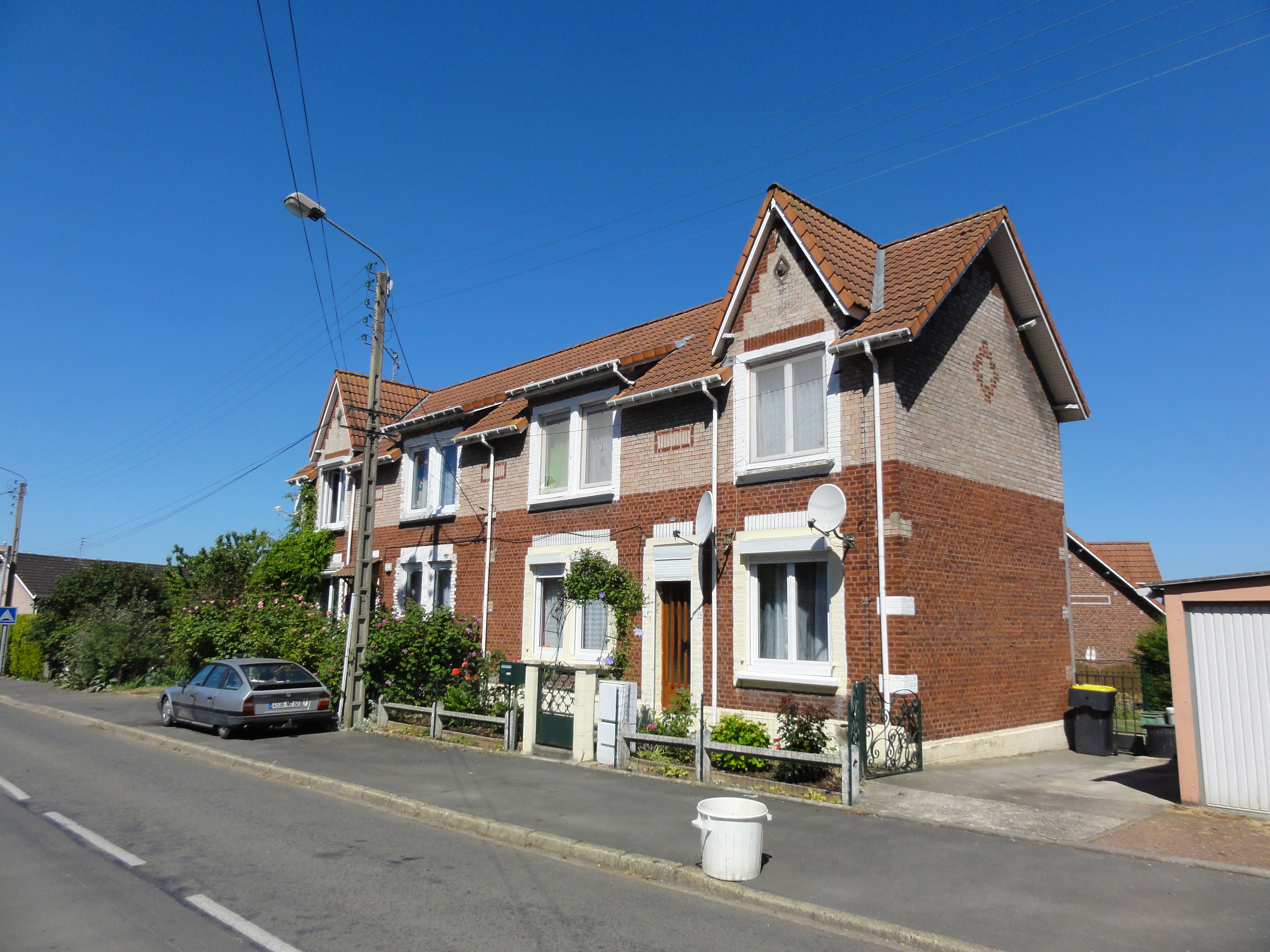 Cités de la Fosse n° 6 - 6 bis de la Compagnie des mines de Liévin, Angres, Pas-de-Calais, Nord-Pas-de-Calais, France.